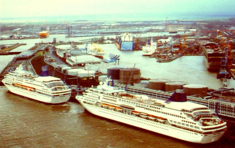 Die bei der Lloyd Werft verlängerte Norwegian Wind an der Columbuspier